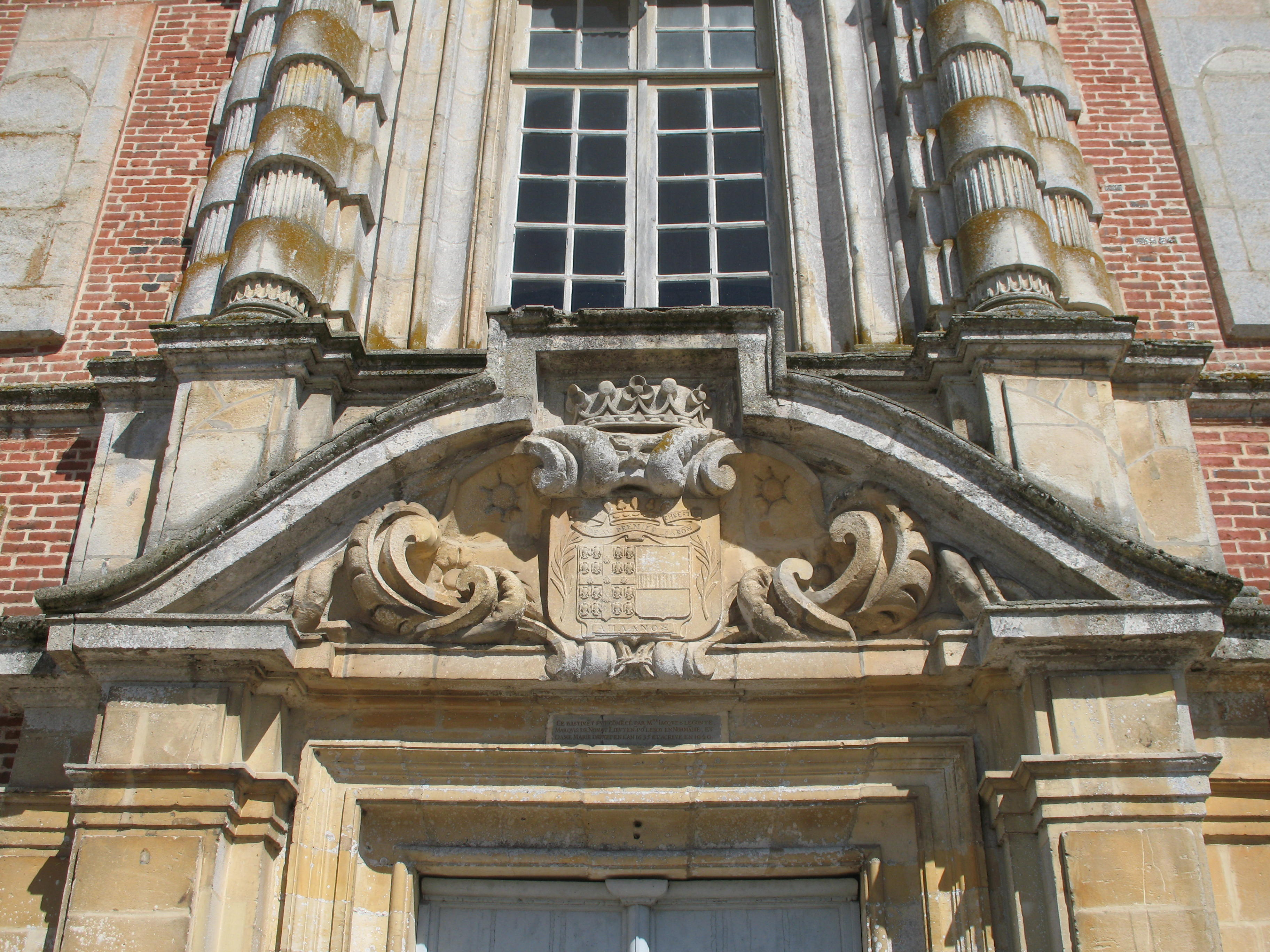 Château de Beaumesnil, à Beaumesnil dans l'Eure